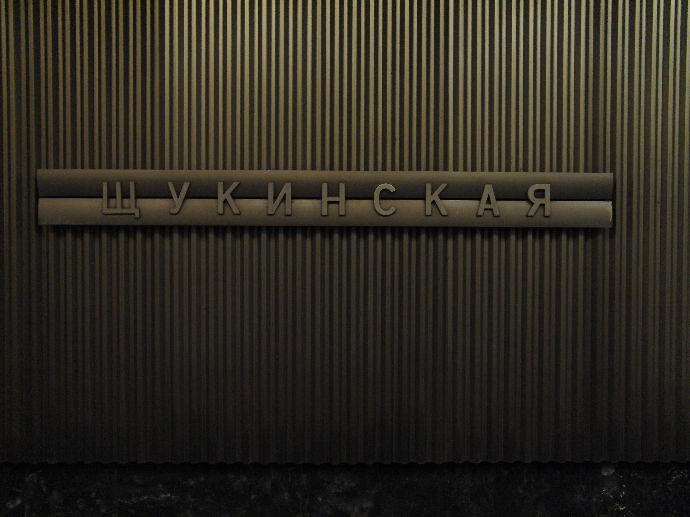 Shchukinskaya (Щукинская)